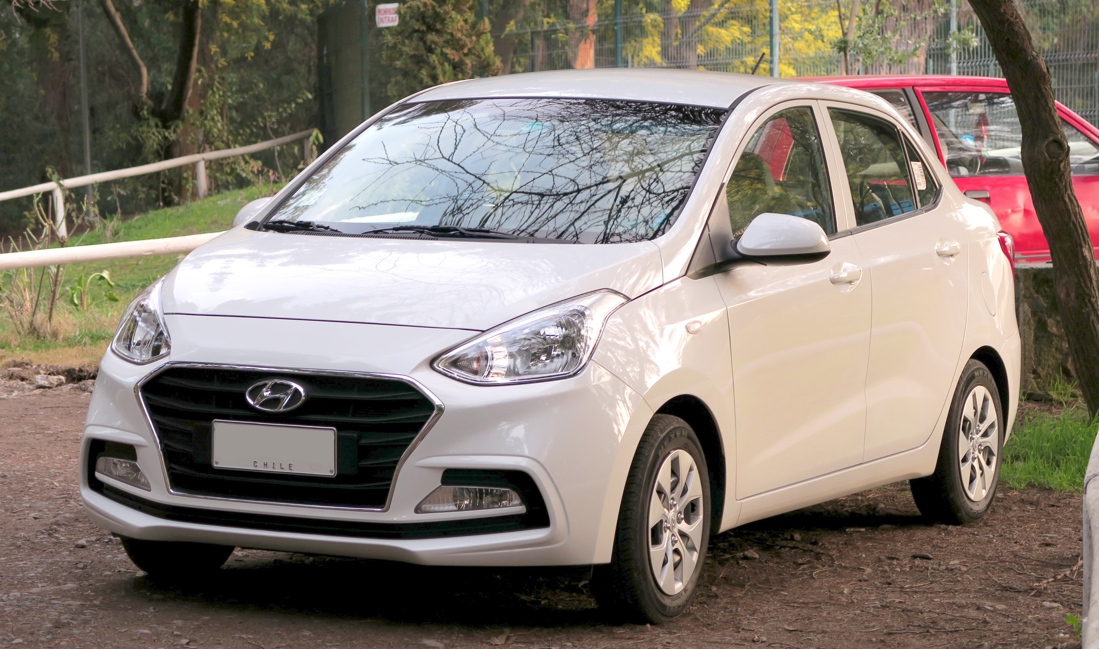 Hyundai Grand i10 1.2 GL Sedan 2018